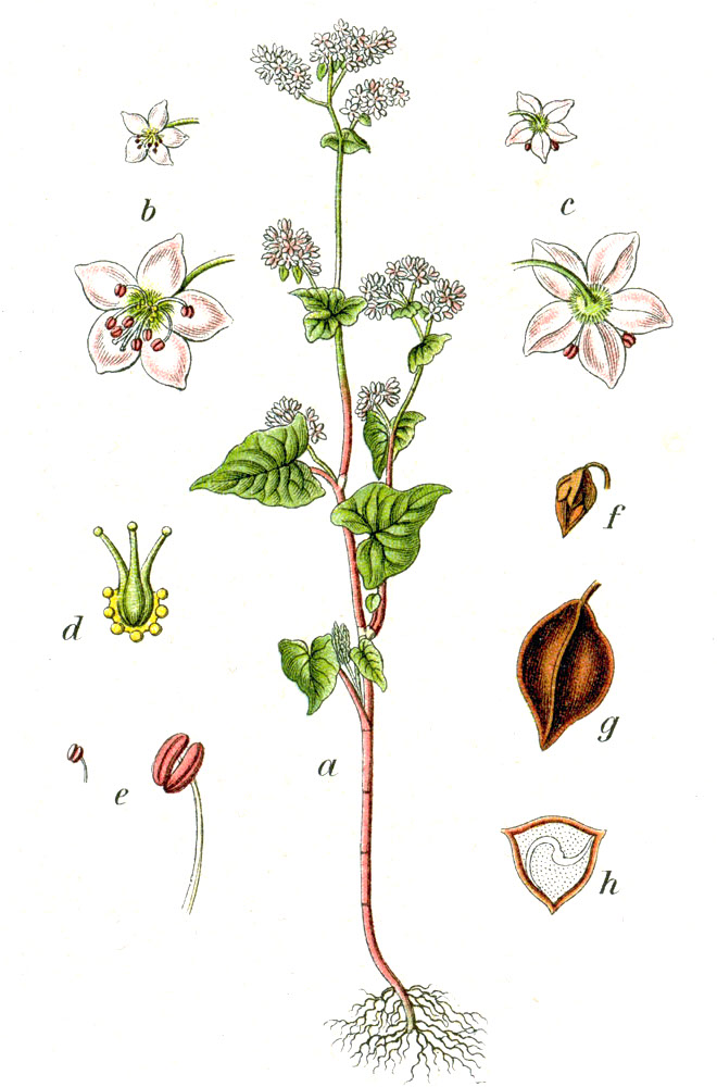 Fagopyrum esculentum Moench, Polygonum fagopyrum L. Original Caption Echter Buchweizen, Polygonum fagopyrum